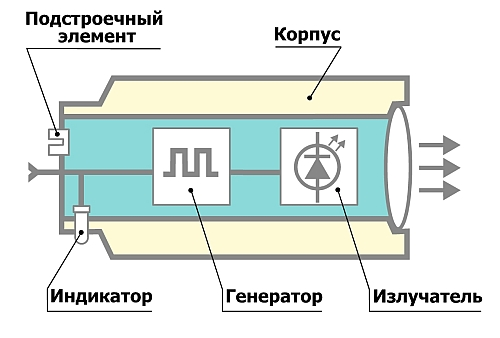 схематическое строение излучателя оптического датчика